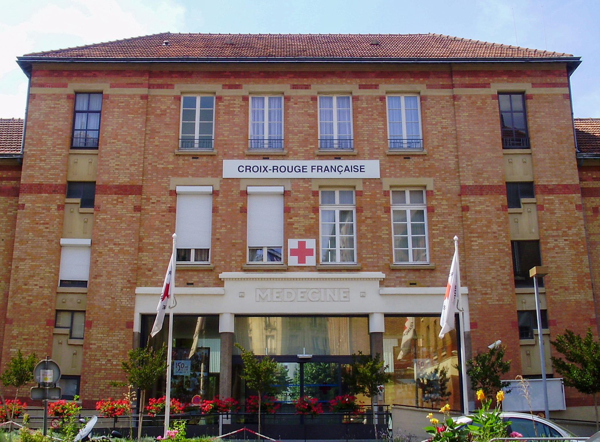 Bâtiment constituant le siège de la Croix-Rouge française, à Paris 14e, France, situé allée Henry-Dunant, dans l'ancien hôpital Broussais. Toutefois, l'adresse officielle du siège est au 96 de la rue Didot.